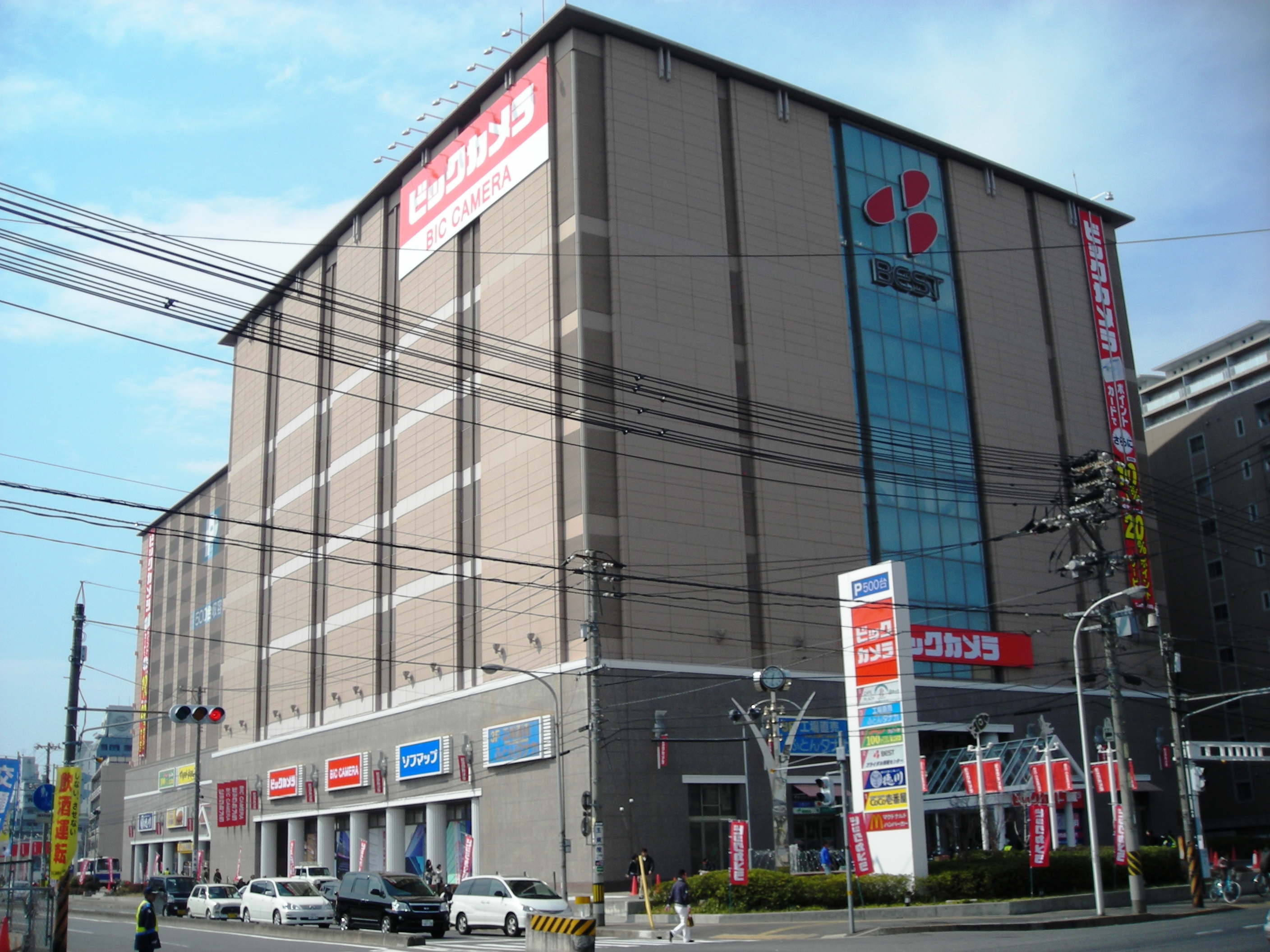 ビックカメラ ベスト広島店